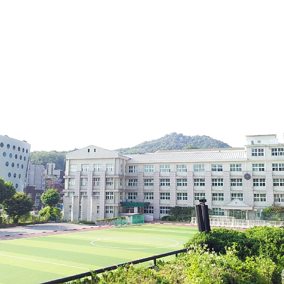 이대부고의 텃밭에서 찍은 이대부고 건물